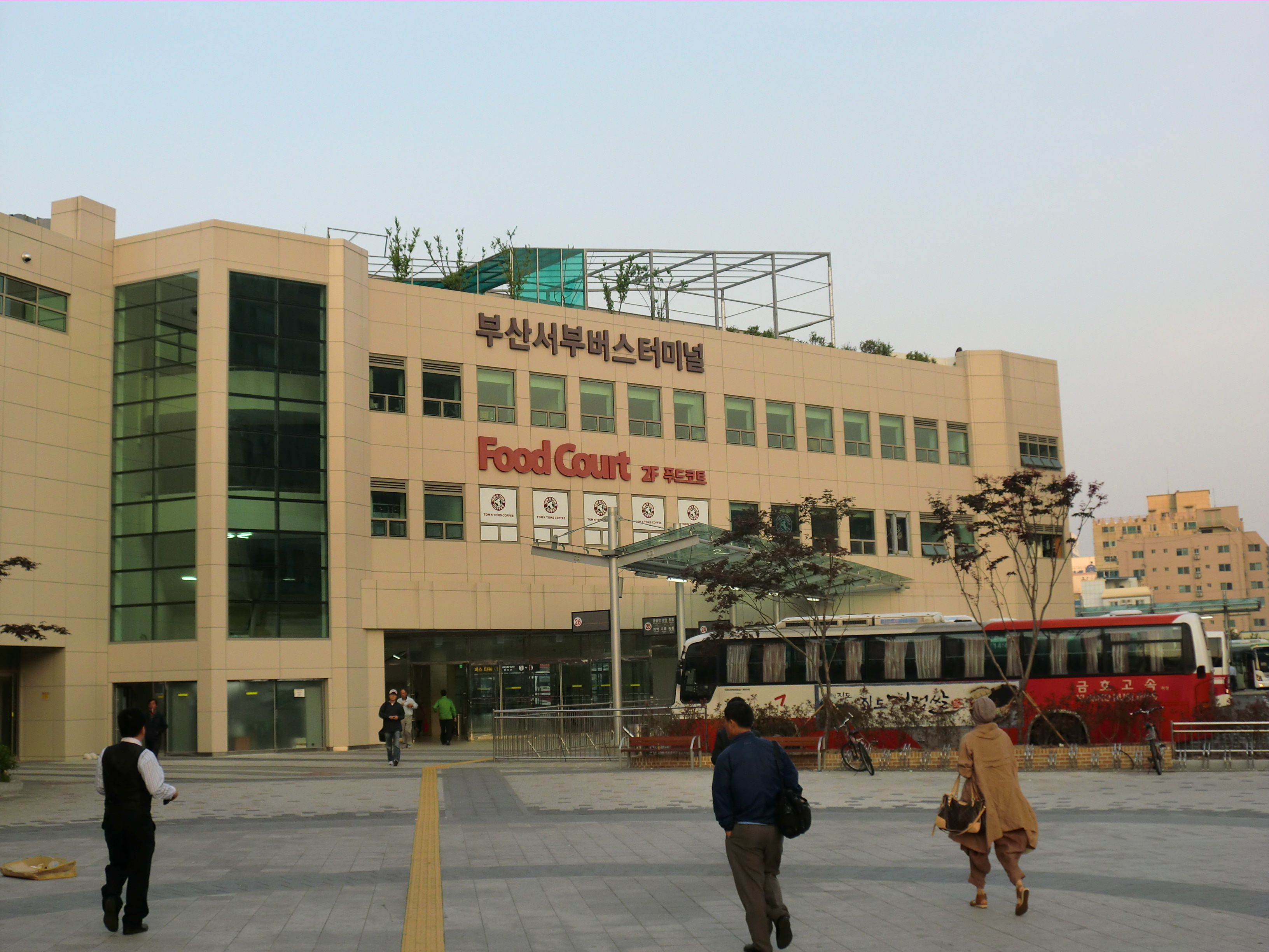 부산광역시 사상구에 있는 부산서부버스터미널